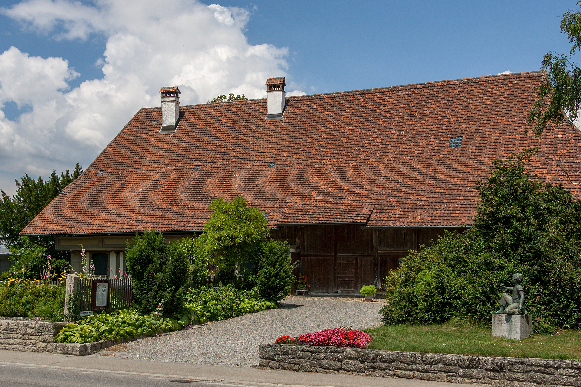 Ehemaliges Wohnhaus und heutiges Museum "Ankerhaus" in Ins (BE)